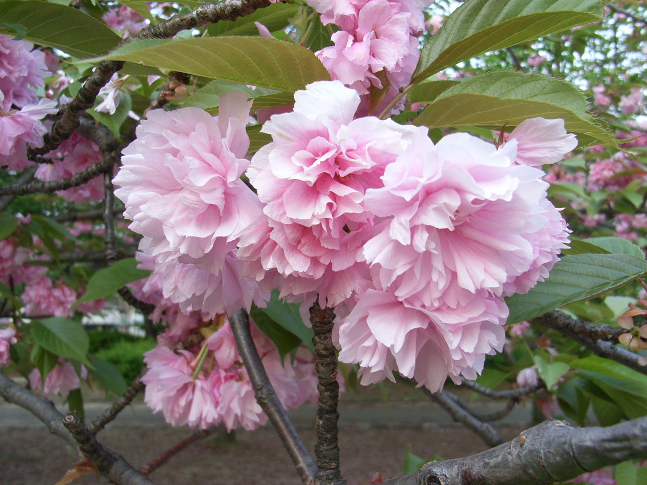 八重桜